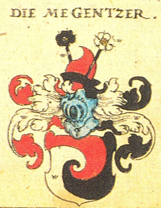 Ritterschaft und Adel aus Schwaben Die Megentzer / Megenzer von Velldorf